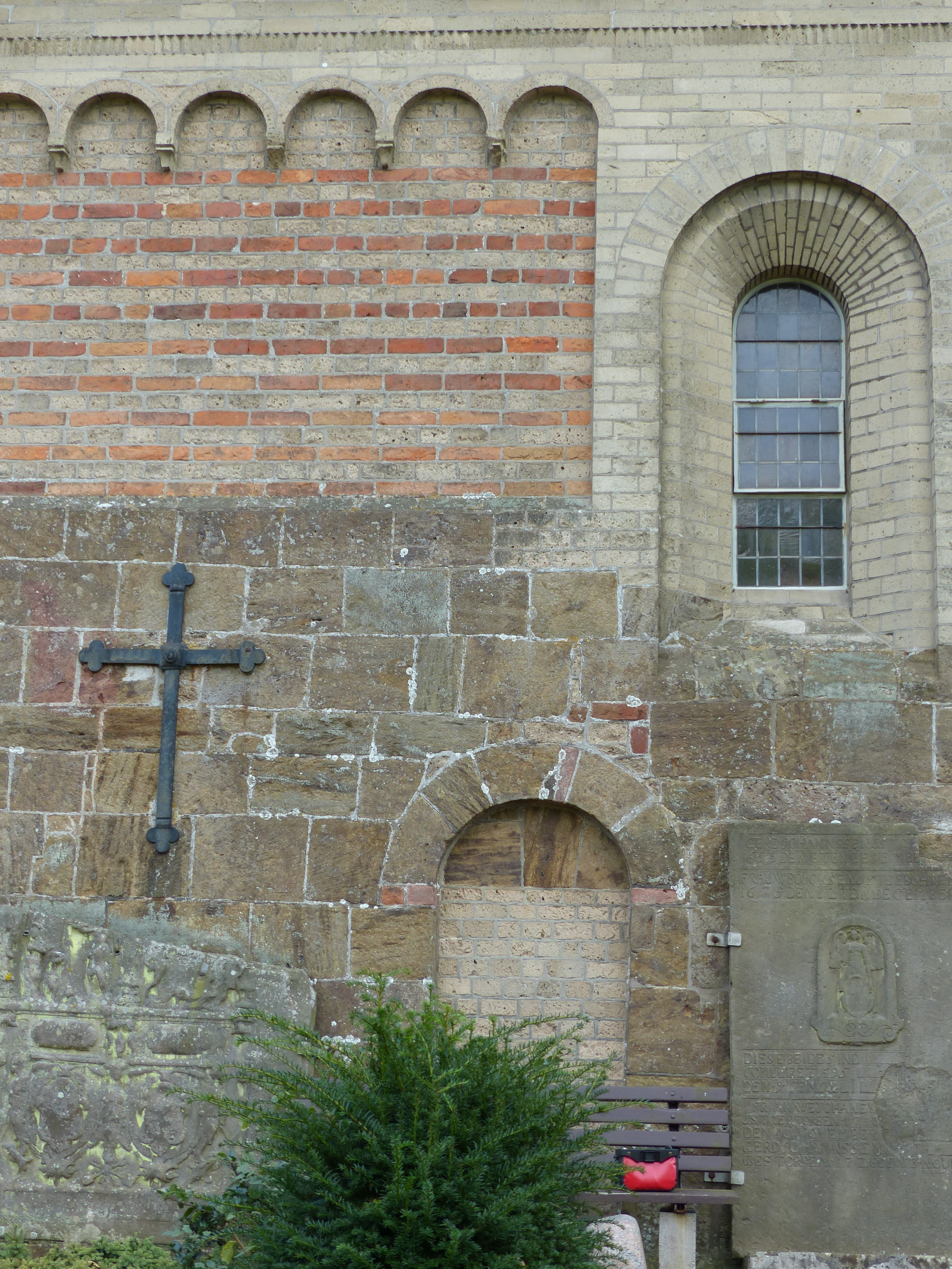 Kirche in Blexen, Bänderung von Tuff und Backstein am Chor 12. Jh., Breite des Hagioskops 93 cm, Fensterlaibung aus grauen Mauerziegeln 1880